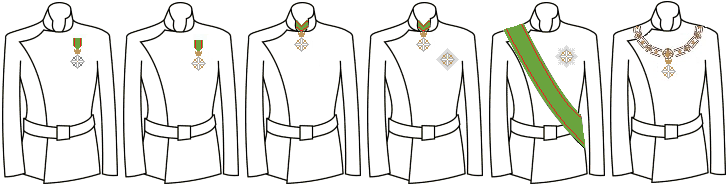 Modo di indossare le decorazioni dell'Ordine al Merito della Repubblica Italiana (Italia) - vecchio tipo